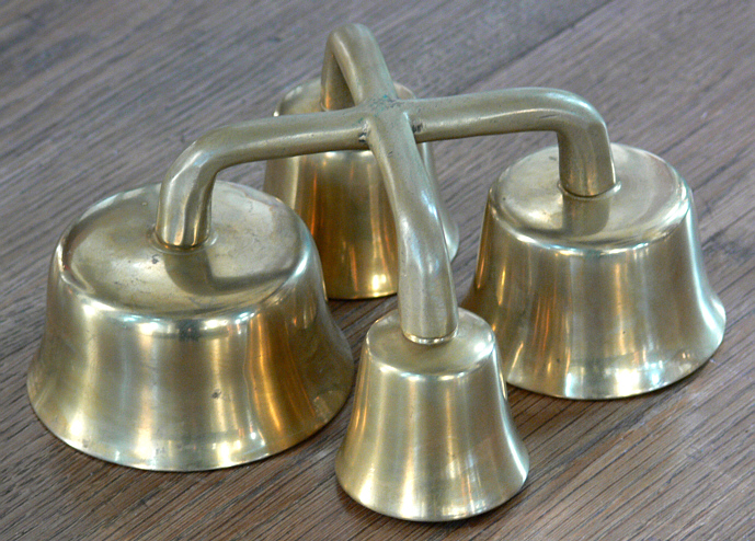 Altarschellen (auch Schellen oder Wandlungsglocke genannt), wie sie von Ministranten in einer römisch-katholischen Messe gebraucht werden. Vier von unterschiedlichem Durchmesser, daher unterschiedlich hoh klingend, an einem kreuzförmigen Haltegriff.